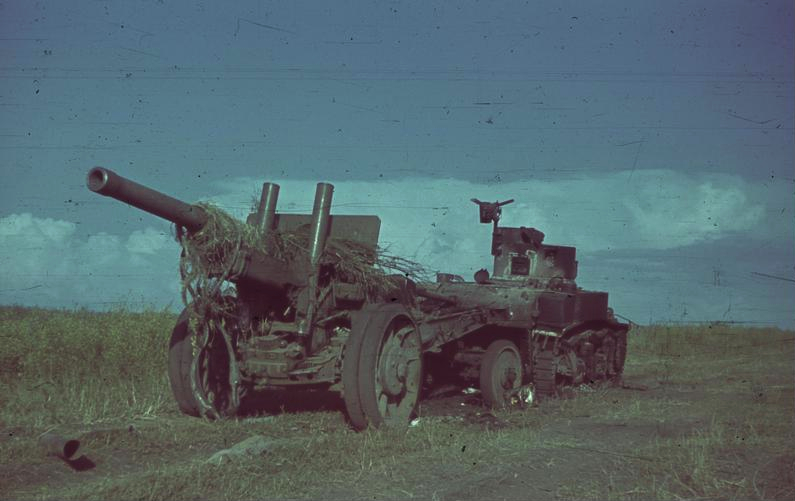 Aufnahmen aus den Bereichen der Kesselschlacht am Charkow, Mai 1942, Nr. 26 = Panzerspähwagen mit Film-PK-Berichter